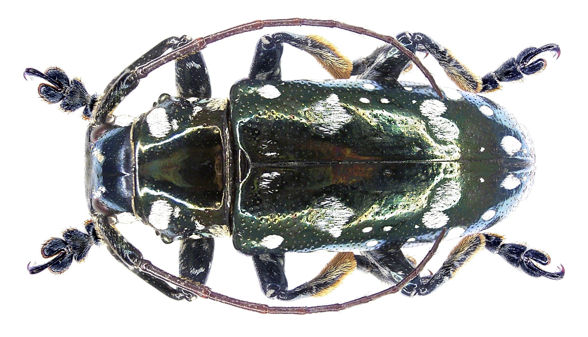 Familie: Cerambycidae Grösse: 23 mm Fundort: Philippinen, Leyte, Balocane leg. 2006; det. A.Weigel Foto: U.Schmidt, 2007